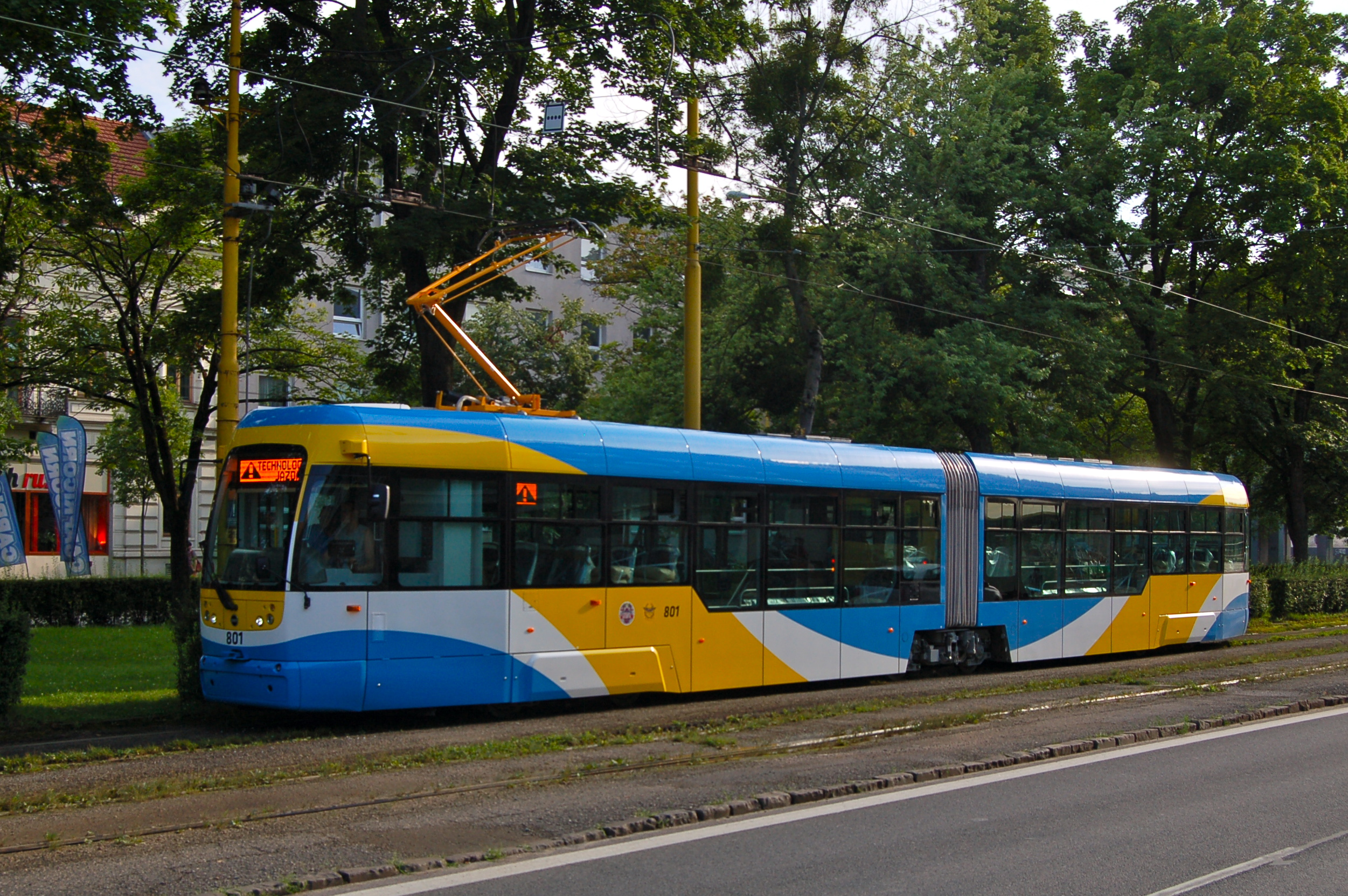 Tram Vario LF2+ Košice č801 Rue Šturová